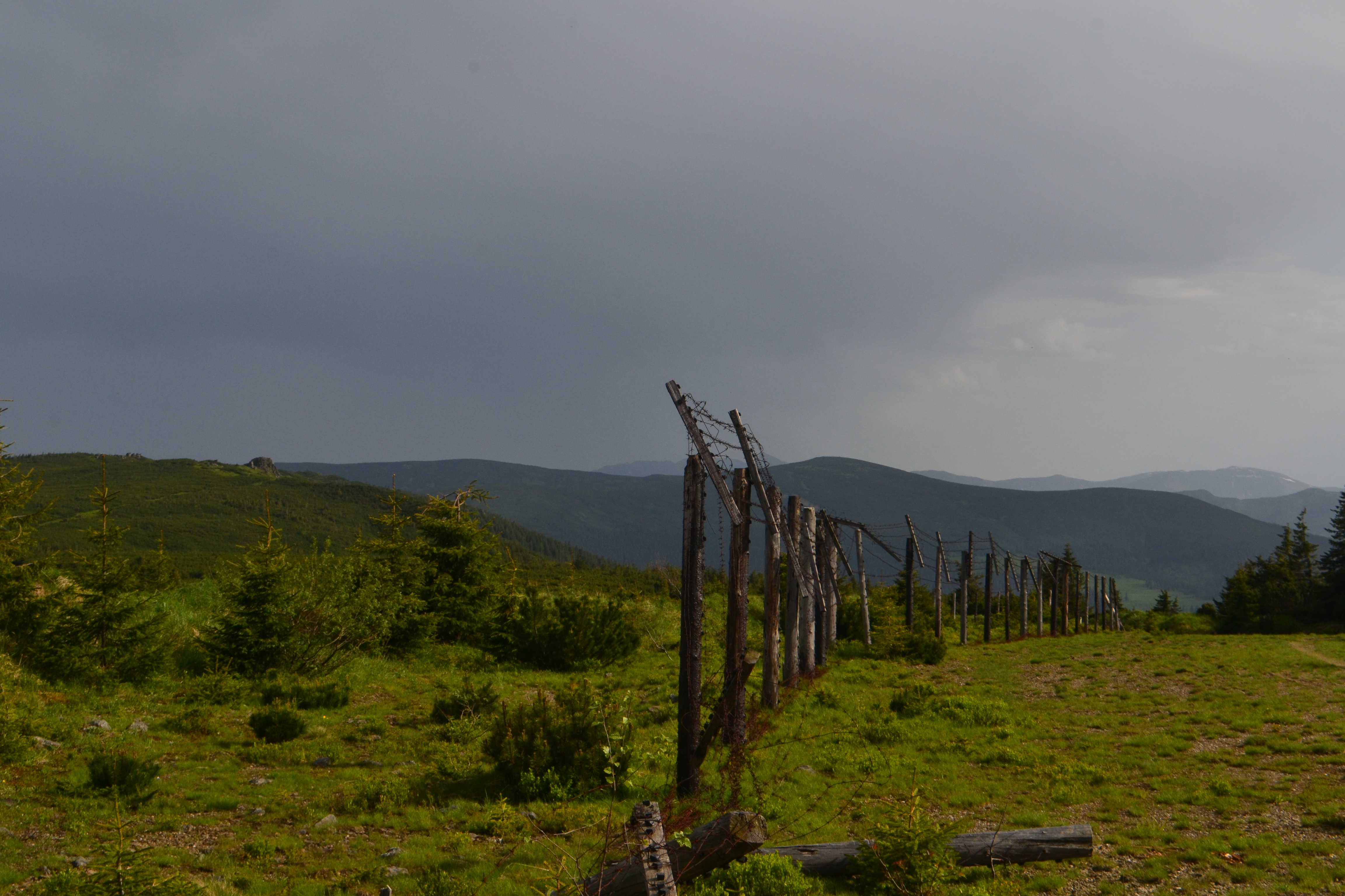 Україно-румунський кордон на горі Палениця